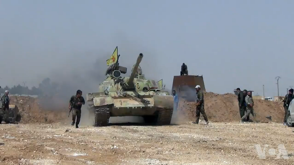 Membres des YPG près de Tall Tamer c. 22 mai 2015